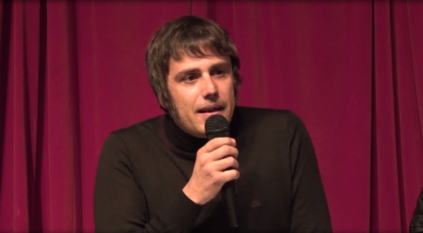 Ese partido del que usted me habla. 27 de febrero de 2019. La Morada. Arganzuela